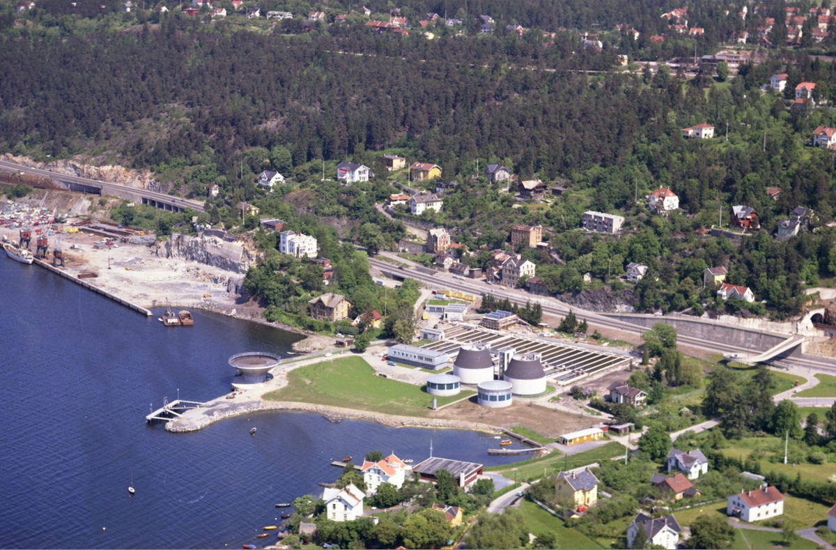 Bekkelaget renseanlegg 1965. Deler av Bekkelagskollen er sprengt bort.